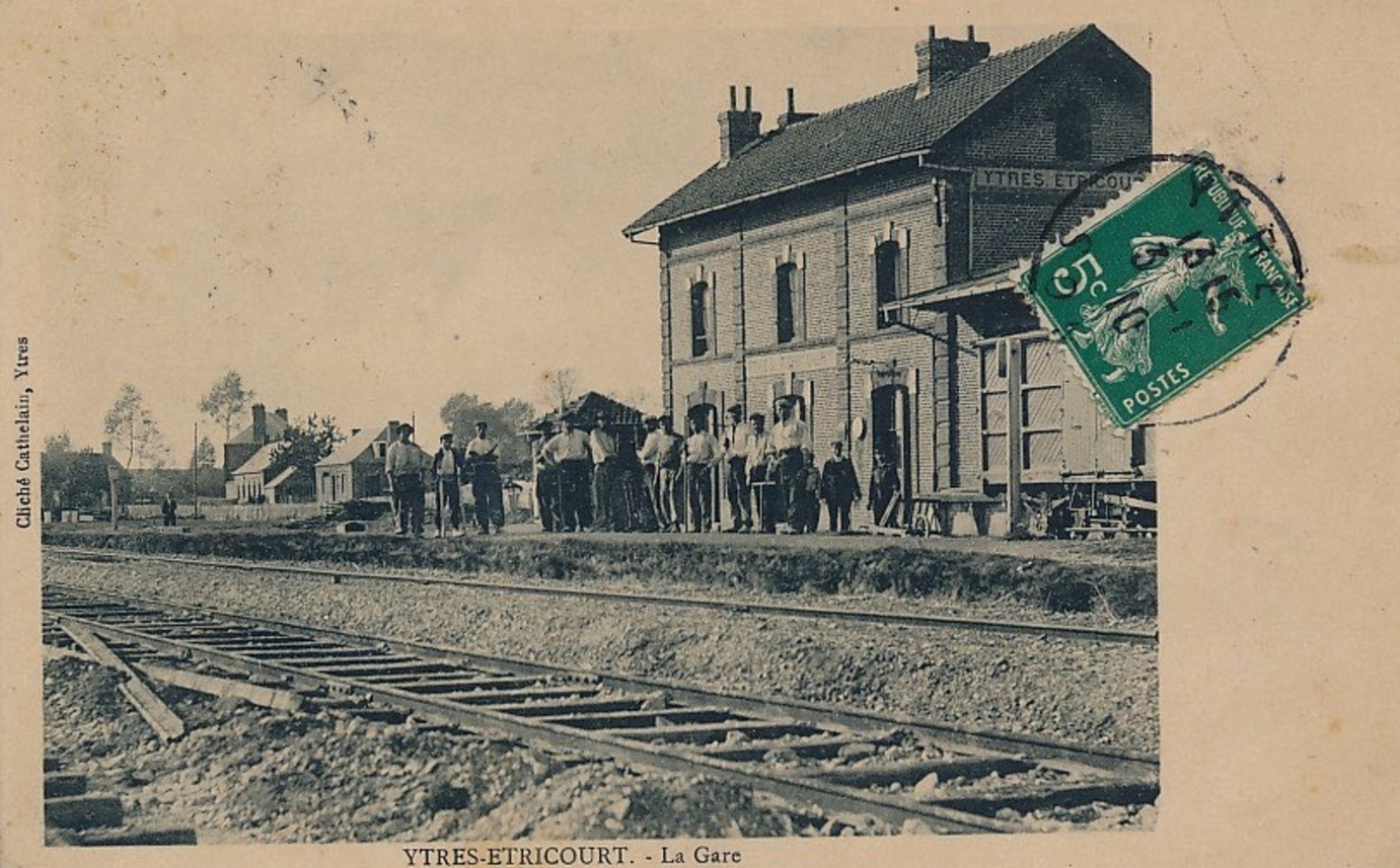 La gare d'Ytres-Etricourt vers 1910.